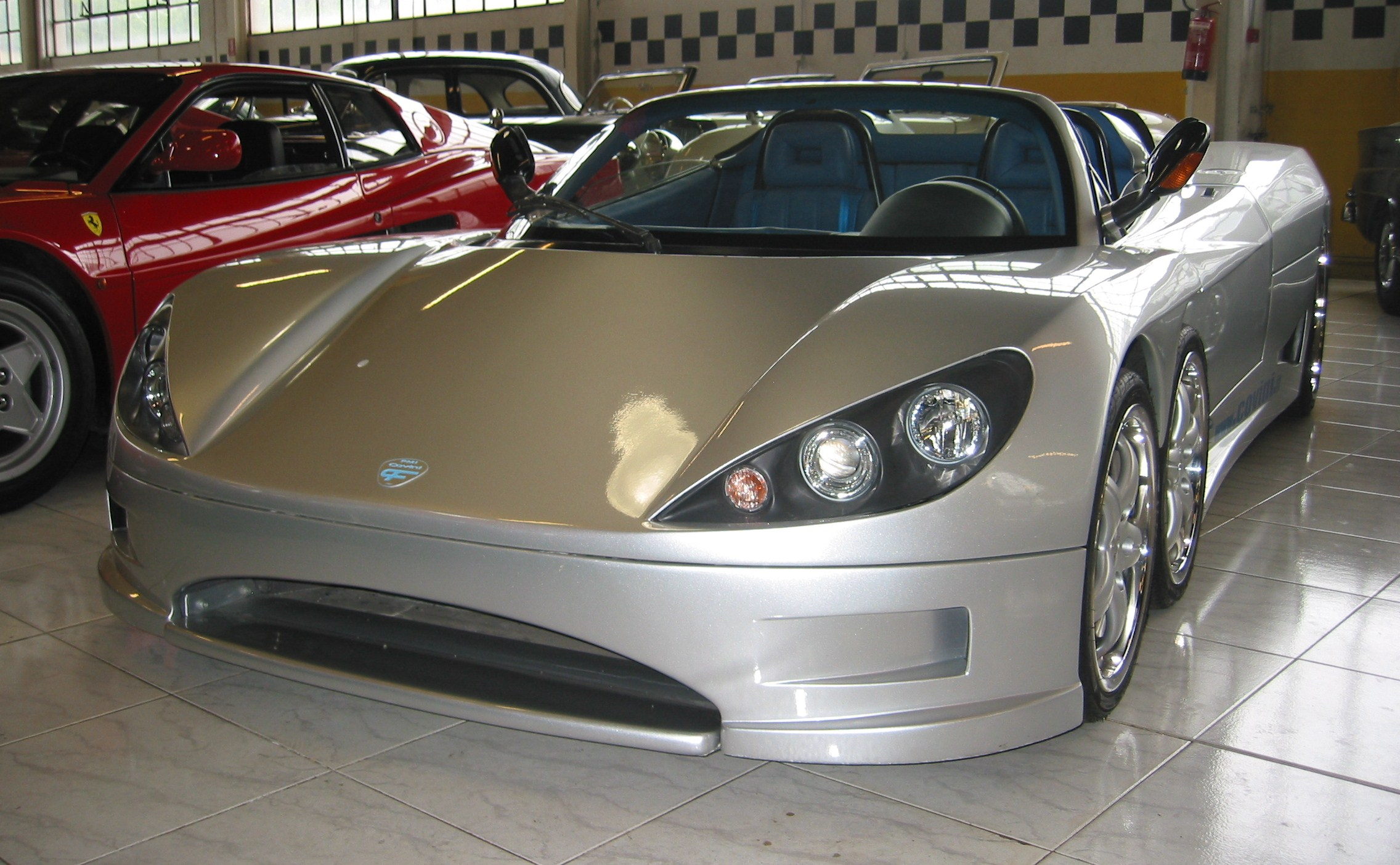 Covini